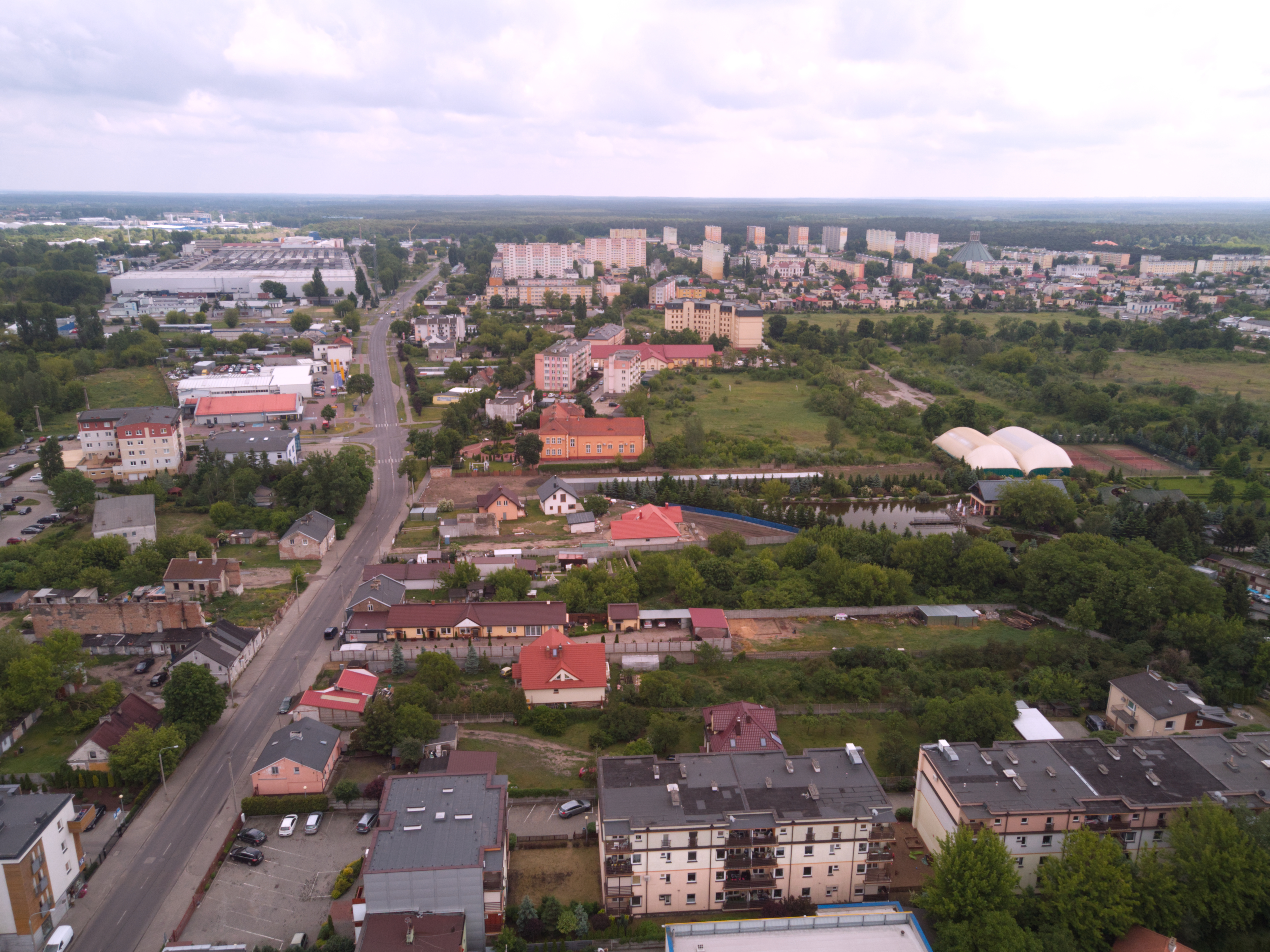 Ulica Stodólna i Polna (2020 r.)